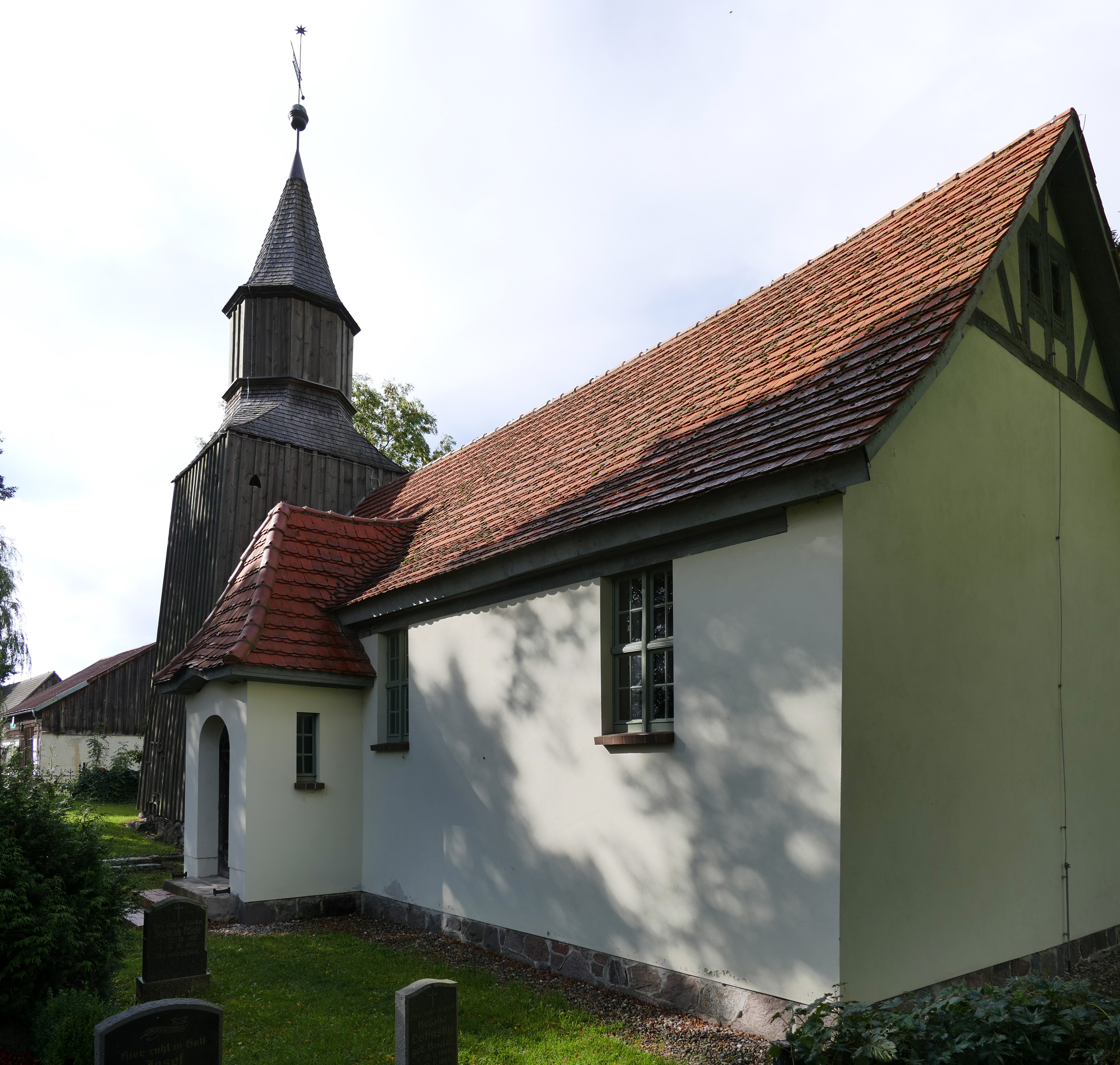 Kirche Lebbin, Groß Teetzleben, Ansicht von Südosten